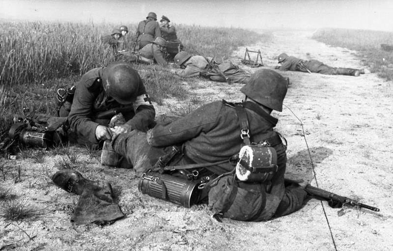 Scherl Bilderdienst Frankreich: in der vordersten Linie wird unseren Soldaten die erste Hilfe gebracht. PK: Eckart [PK 670]; Juni 1940 7982-40